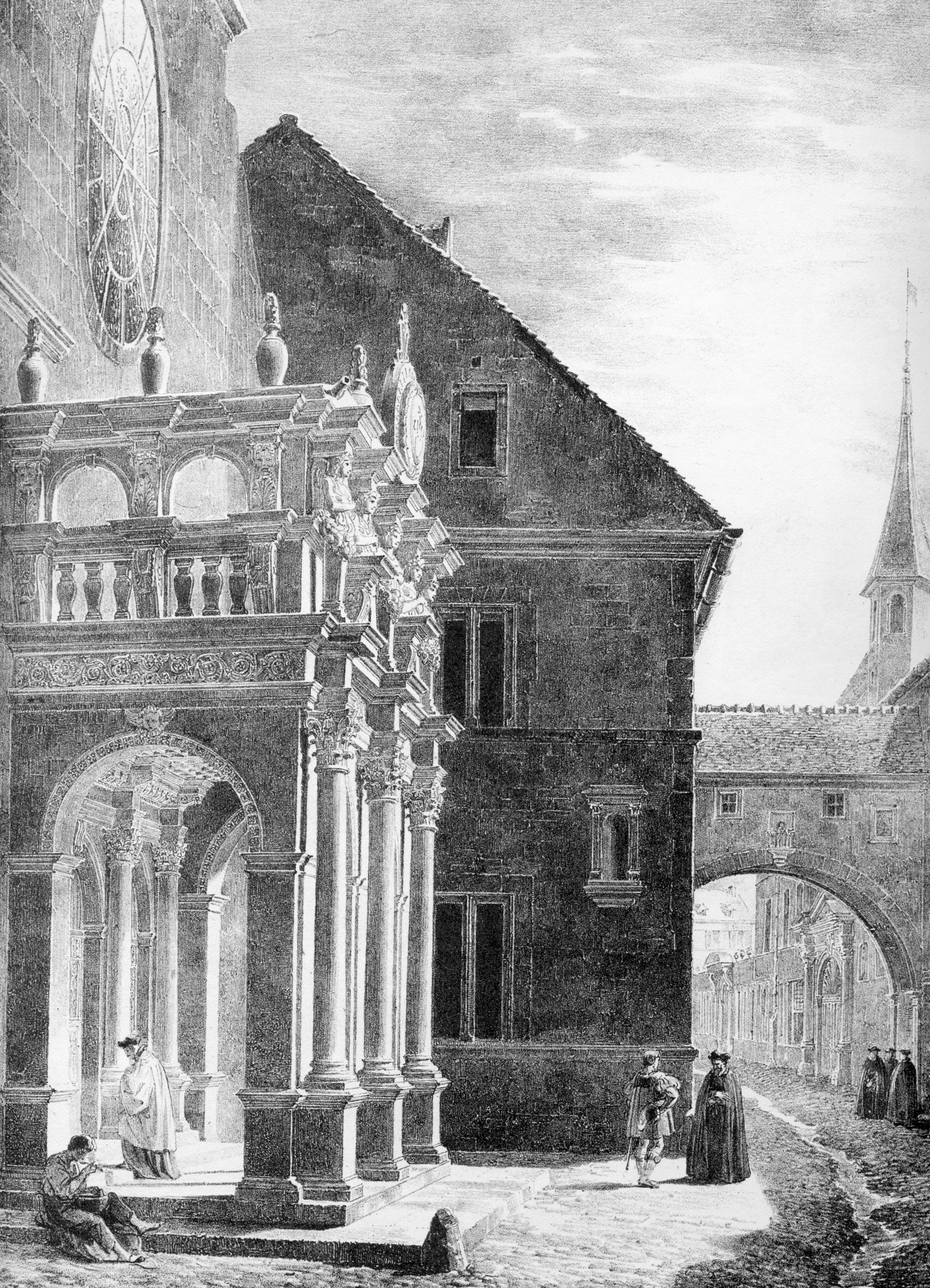 Collège des Jésuites à Dôle